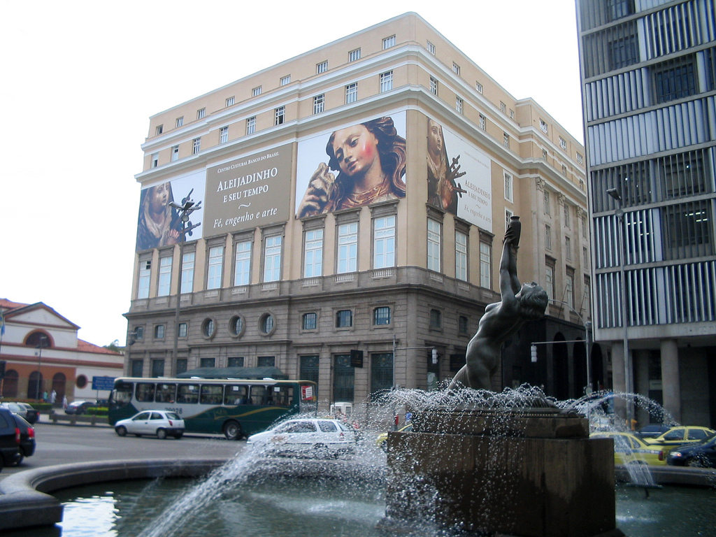 Centro Cultural (Cultural Centre) Banco do Brasil (CCBB) in Rio de Janeiro, Brazil.